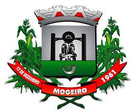 Brasão do município de Mogeiro, no estado da Paraíba, Brasil.